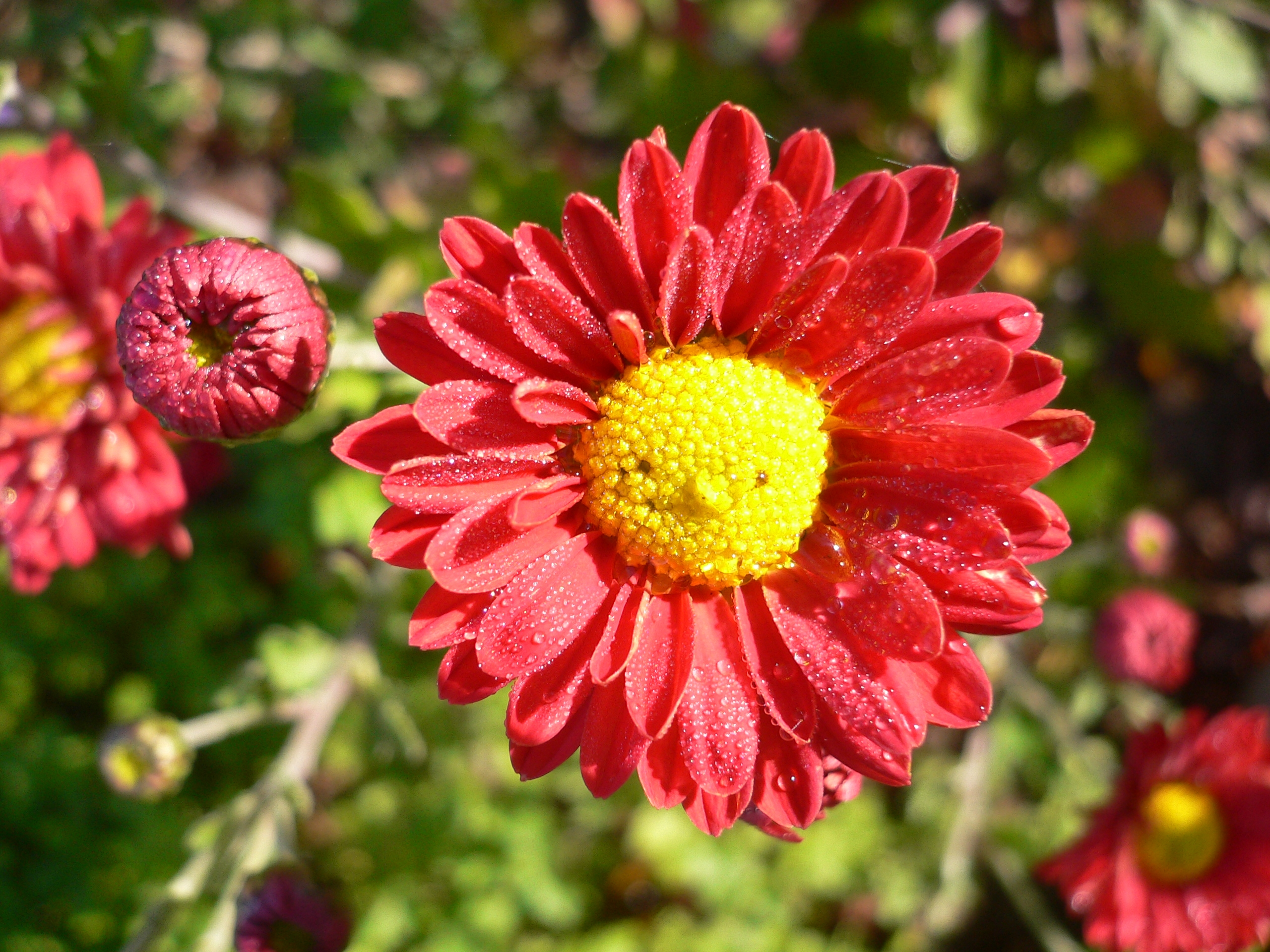 Aster